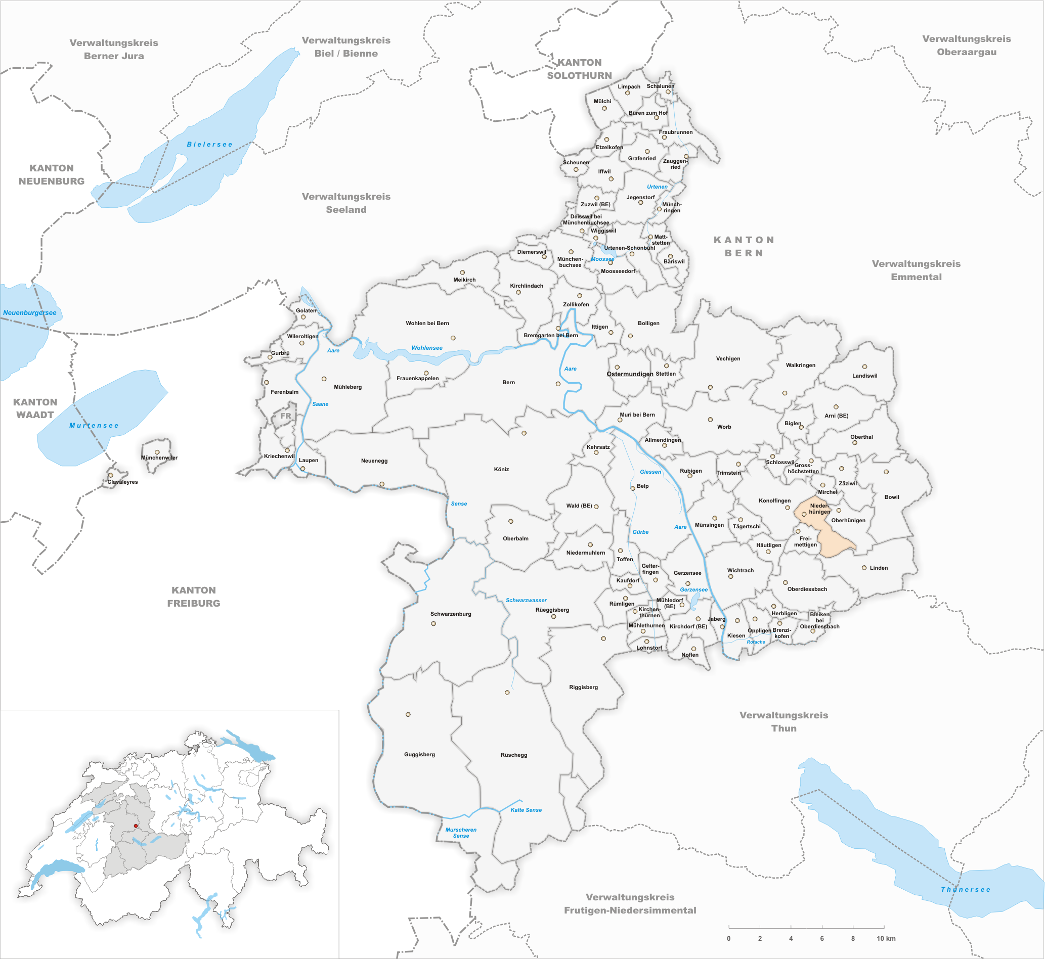 Municipality Niederhünigen